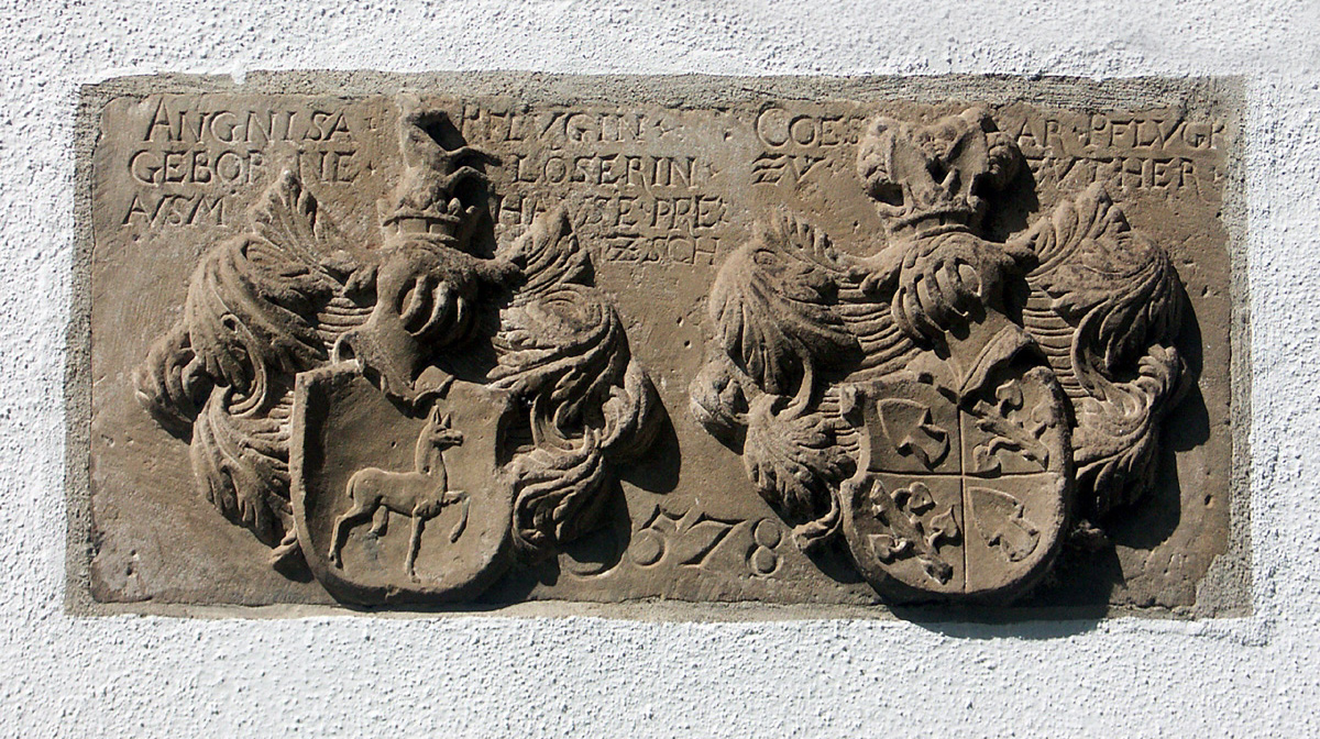 Wappenstein an der Andreaskapelle in Leipzig-Knautnaundorf für Frau Agnes Pflugk, geborene Löser, und ihren Sohn Caesar. Beide starben im Jahr 1578. Der Stein stammt aus der ehemaligen Kirche Eythra.